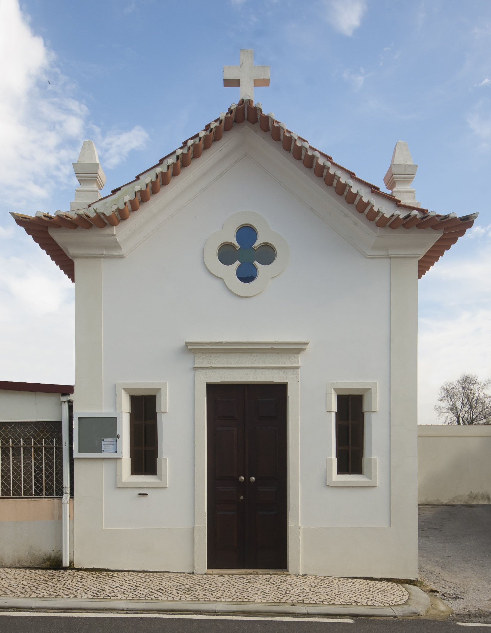 Esta é uma capela do século XVIII, construída para S. José mas em homenagem à Rainha Santa Isabel de Portugal.